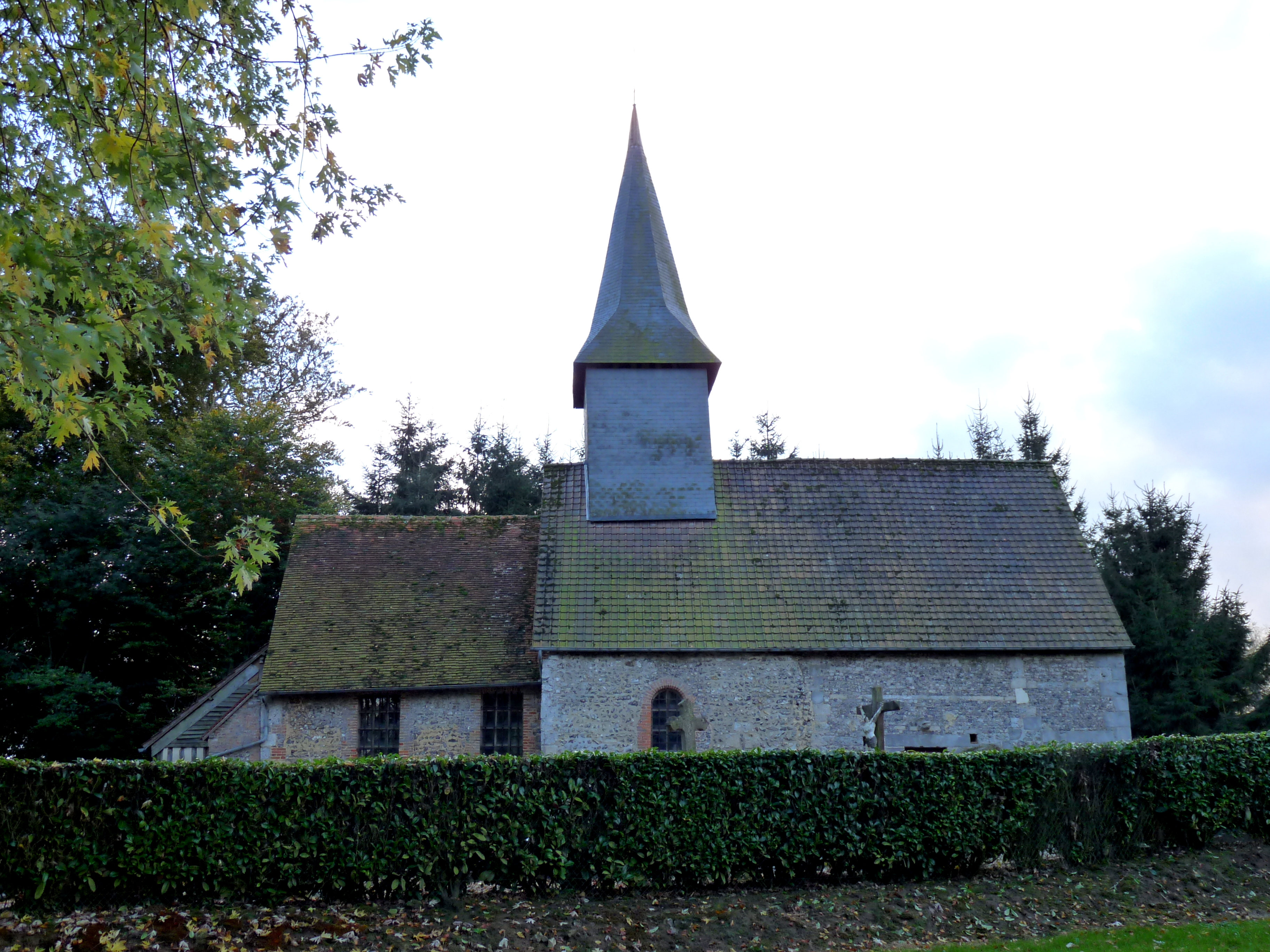 Chapelle de Louvetot .